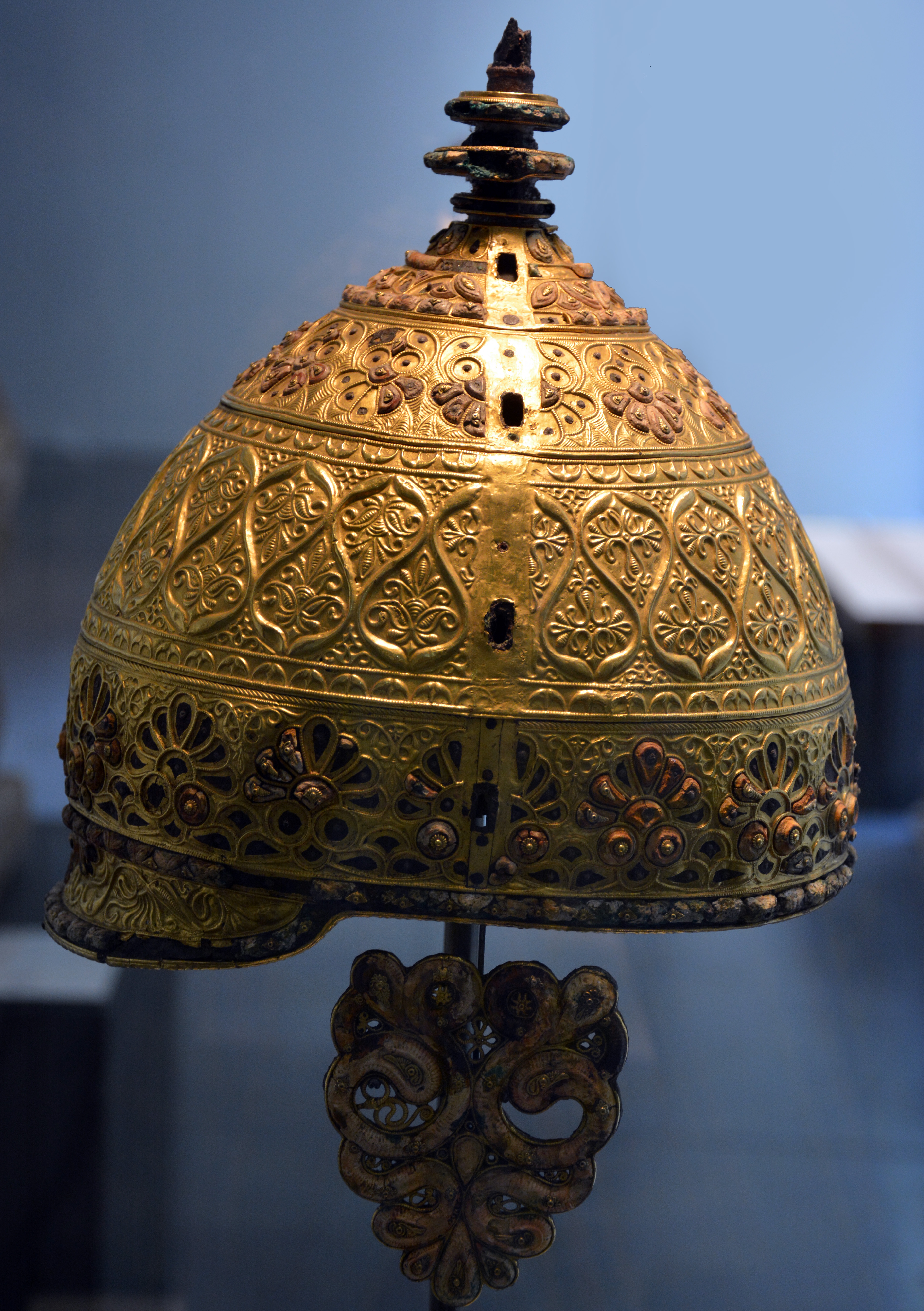 Casque celte et gaulois d'apparat dit casque d'Agris; à coque en fer, recouverte de bronze décoré de feuilles d'or repoussées, rivetées (rivets en argent à tête sertie d'un fleuron d'or), argent et éléments décoratifs de corail sertis dans les alvéoles de certains motifs. il a été découvert à Agris, en Charente dans la grotte des Perrats en 1981 ; probablement fabriqué par des artisans de l'ouest de la gaule. C'est l'une des œuvres majeures de tout l'art gaulois. Il est conservé au musée d'Angoulême. Il est daté du second âge du fer, vers 5ème siècle avant Jésus-Christ. L'or provenait sans doute du Limousin ou du Périgord. Des motifs réalisés avec du fil d'or bouleté ornent la pièce mobile qui protégeaient la joue. Le motif principal du pare-joue représente un serpent cornu à longue tête, le monstre des enfers, attribut du dieu gaulois Cernunos. Ce casque n'a probablement eu qu'un usage cérémoniel ou est simplement une offrande. Il n'a pas été trouvé dans une sépulture mais dans une grotte-sanctuaire, brisé volontairement (plusieurs parties ont été arrachée et le timbre a été enfoncé par un coup violent).